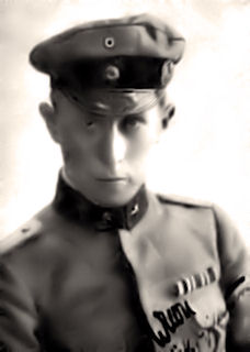 Väinö Vuori